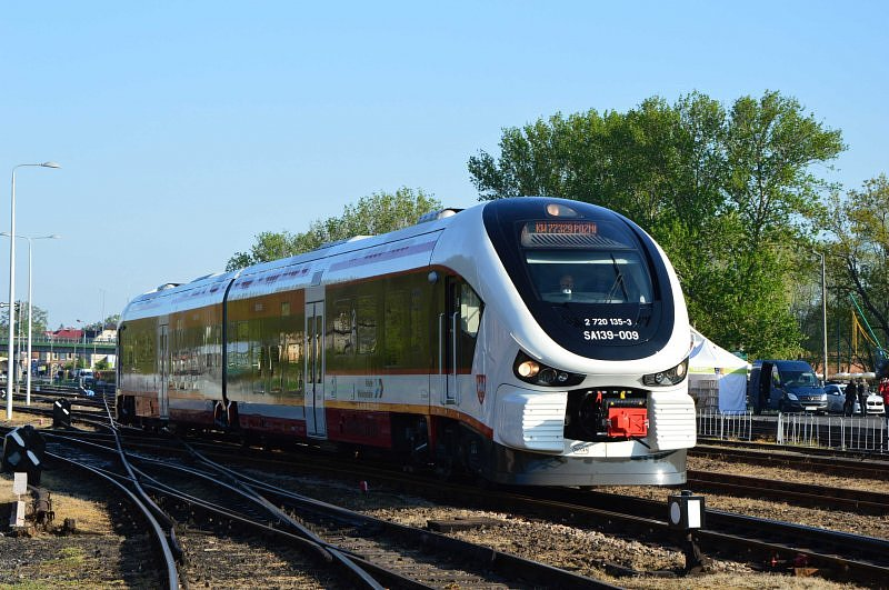 Spalinowy zespół trakcyjny SA139-009 w Wolsztynie.